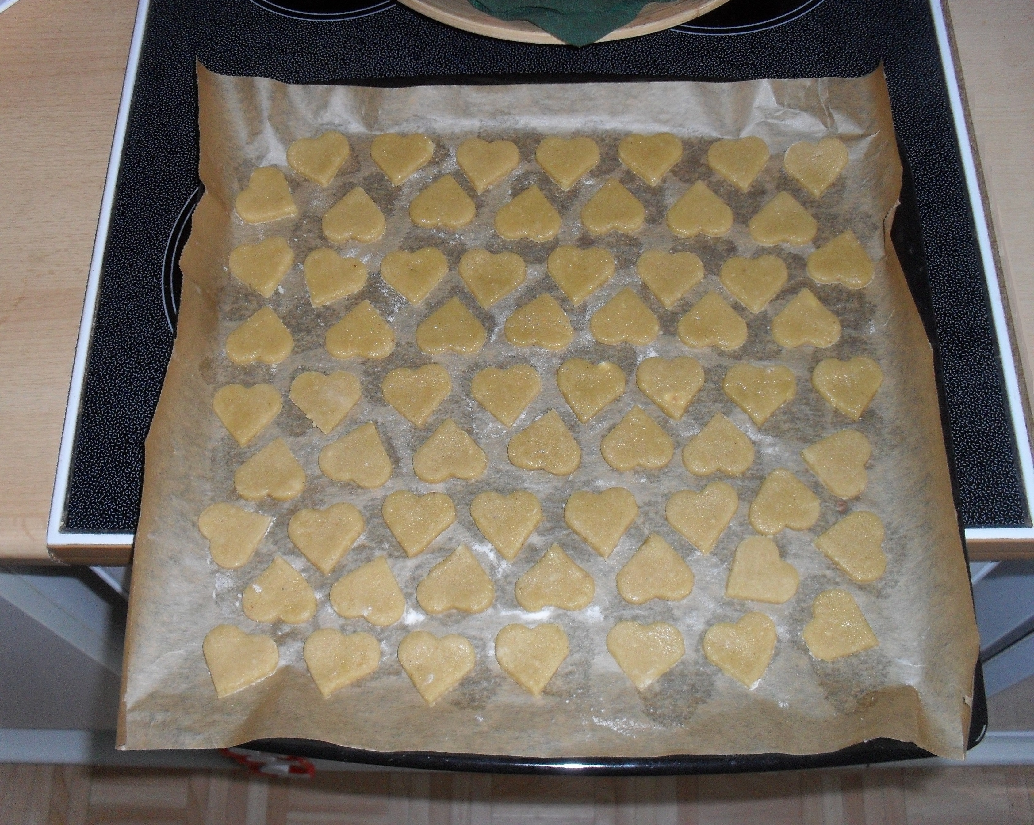 Plätzchen auf dem mit Backpapier belegten Backblech vor dem Backen